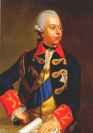 Prins Willem V van Oranje-Nassau, erfstadhouder van de Republiek der Verenigde Nederlanden.